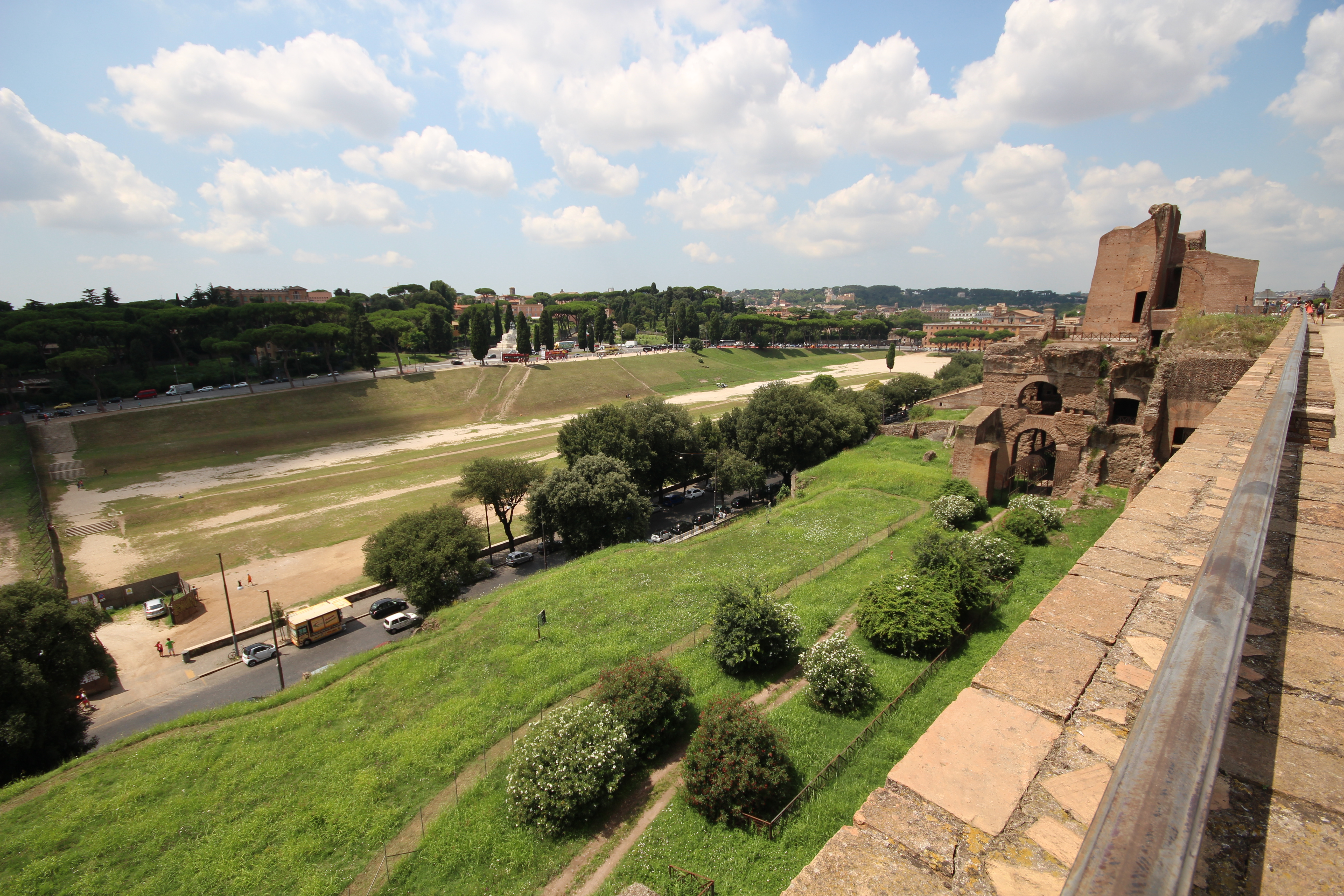 View from Palatine Hill, Rome, Italy. // Vista parcial del Circo Máximo desde el Monte Palatino, Roma, Italia.